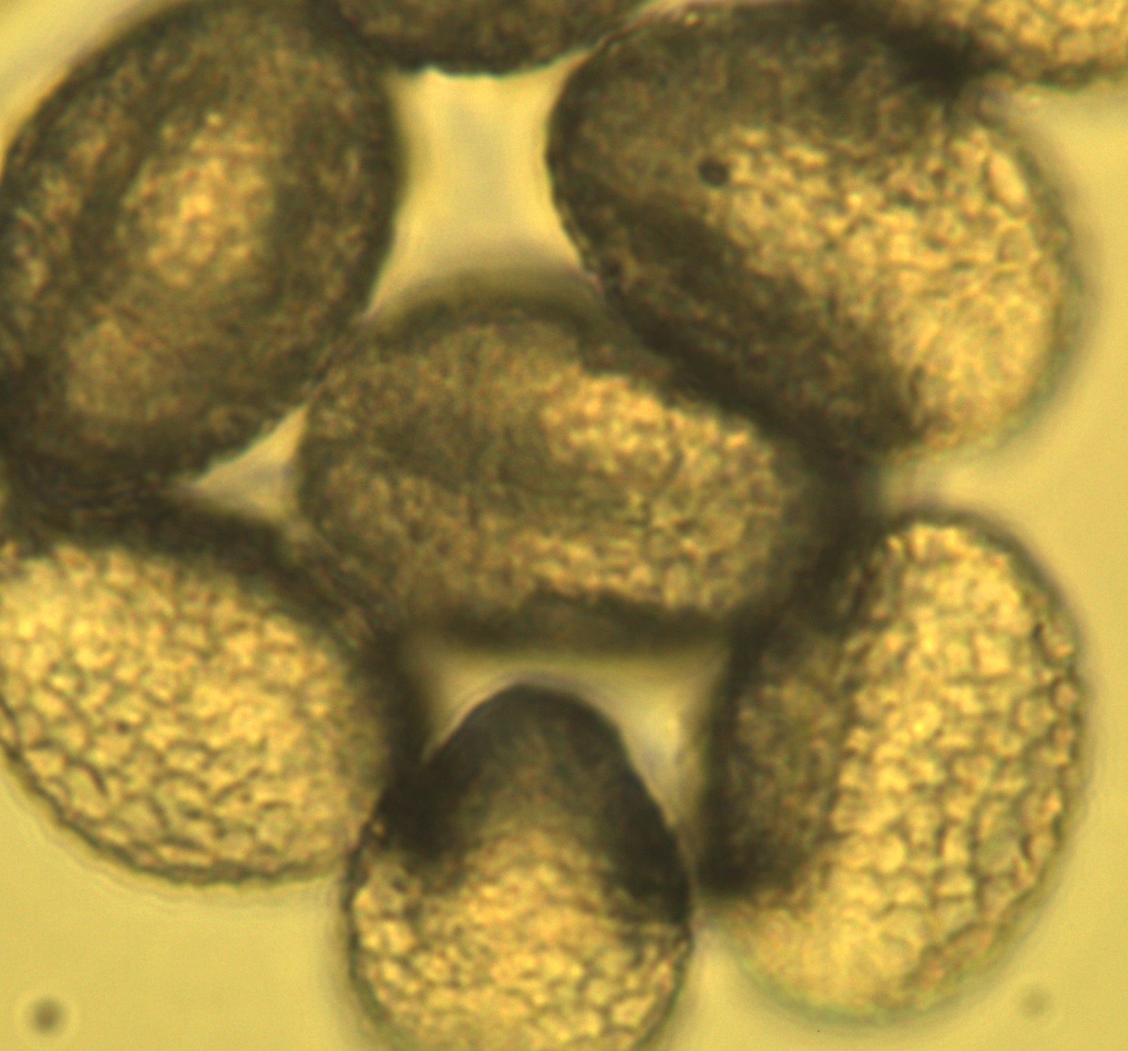 Aubriea Pollen 400x in Glycerin